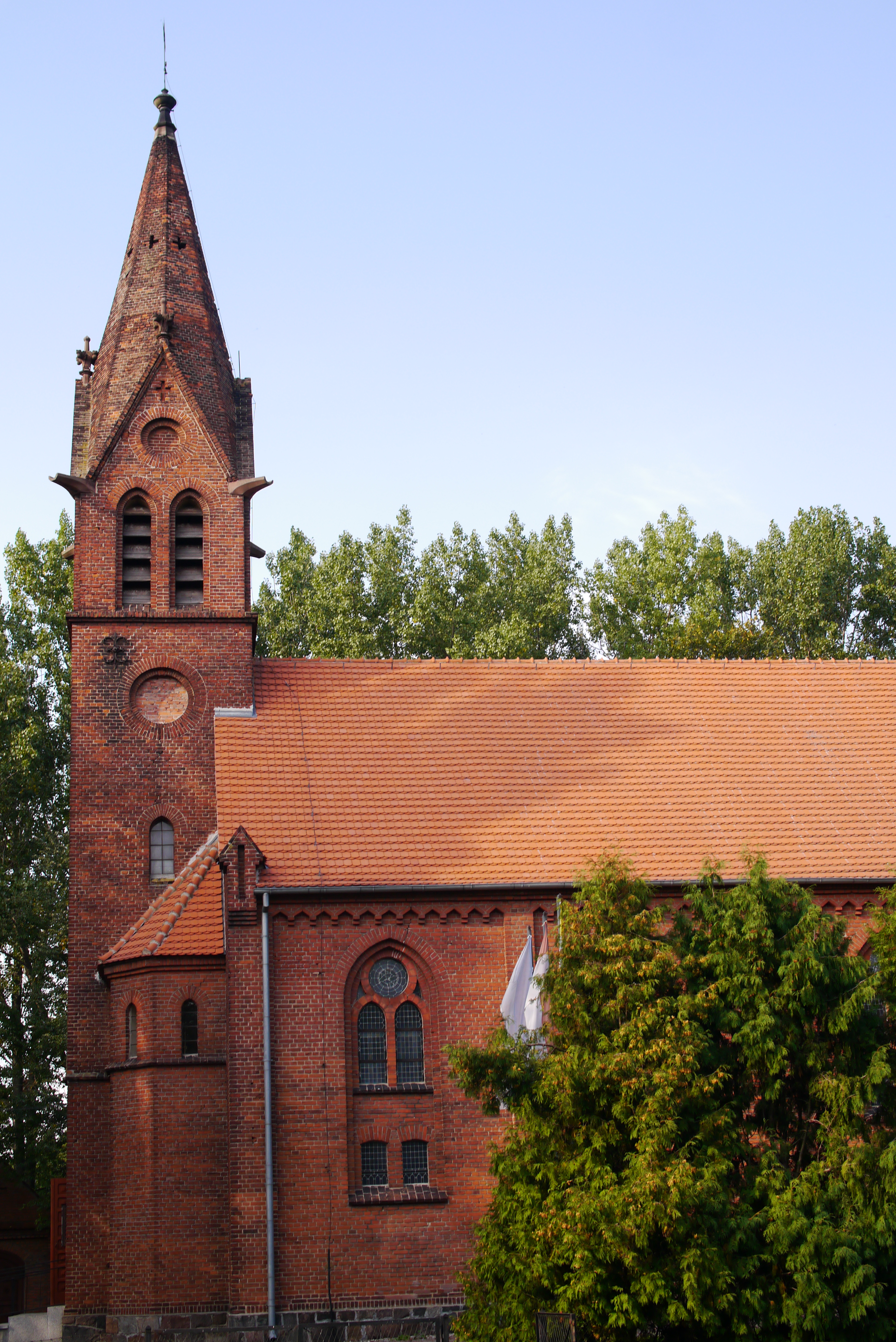 Rzadkwin, zespół kościoła par. pw. św. Rocha